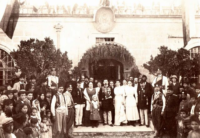 Русский консул в Иерусалиме. Фото монаха Тимона конца XIX века